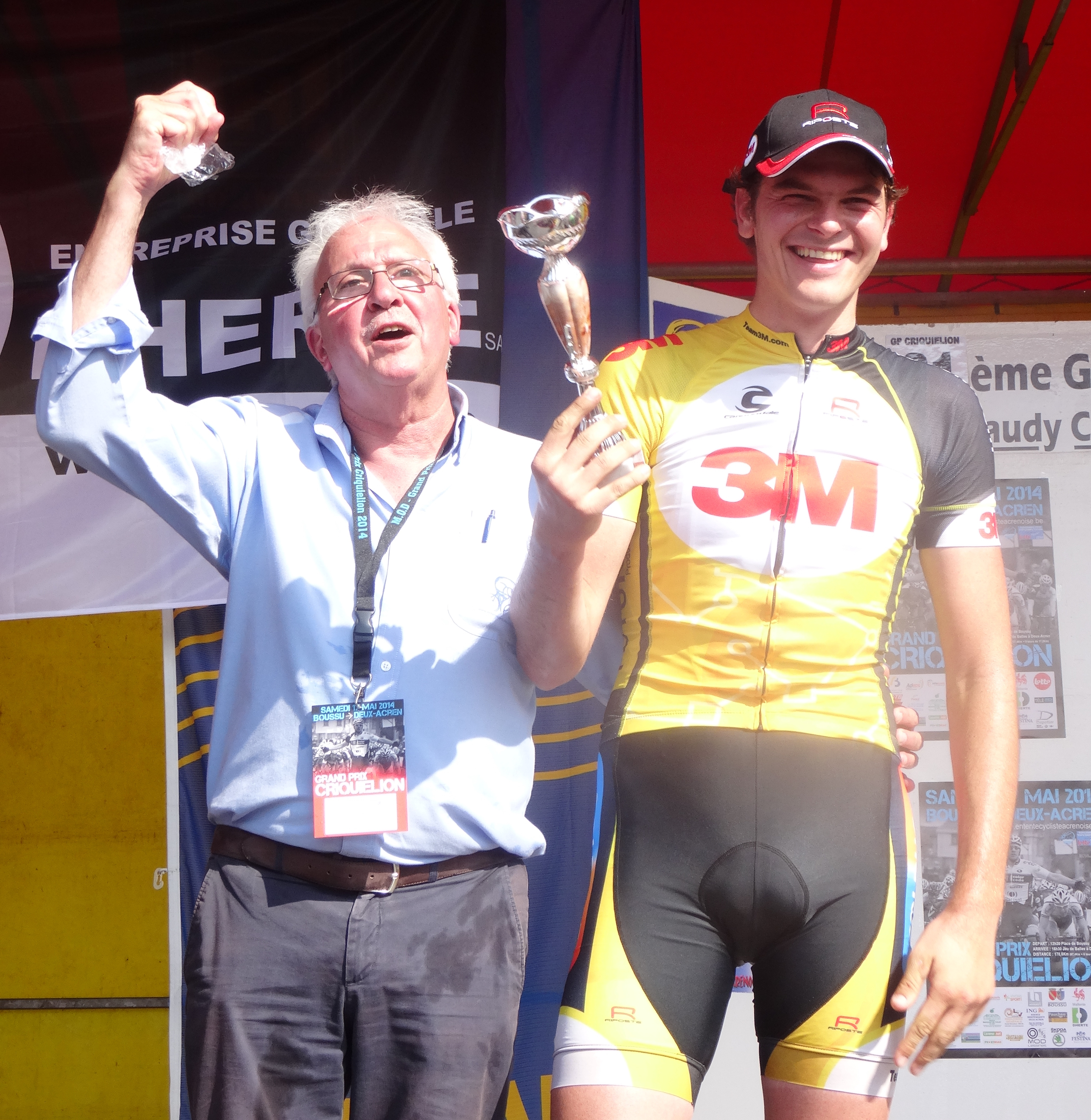 Reportage réalisé le samedi 17 mai à l'occasion de l'arrivée du Grand Prix Criquielion 2014 à Deux-Acren, Belgique.